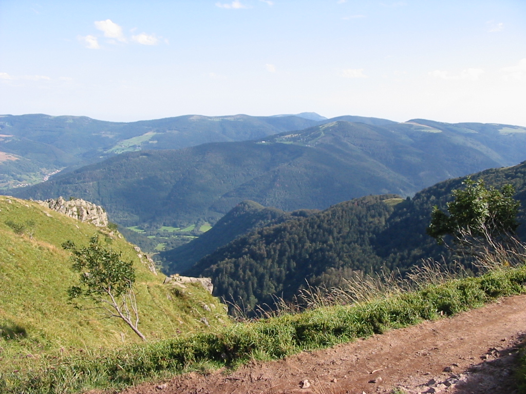 Massif des Vosges: La vallée de Munster vue du Hohneck. Photo personnelle, prise le 23 août 2004 Auteur : Christian Amet